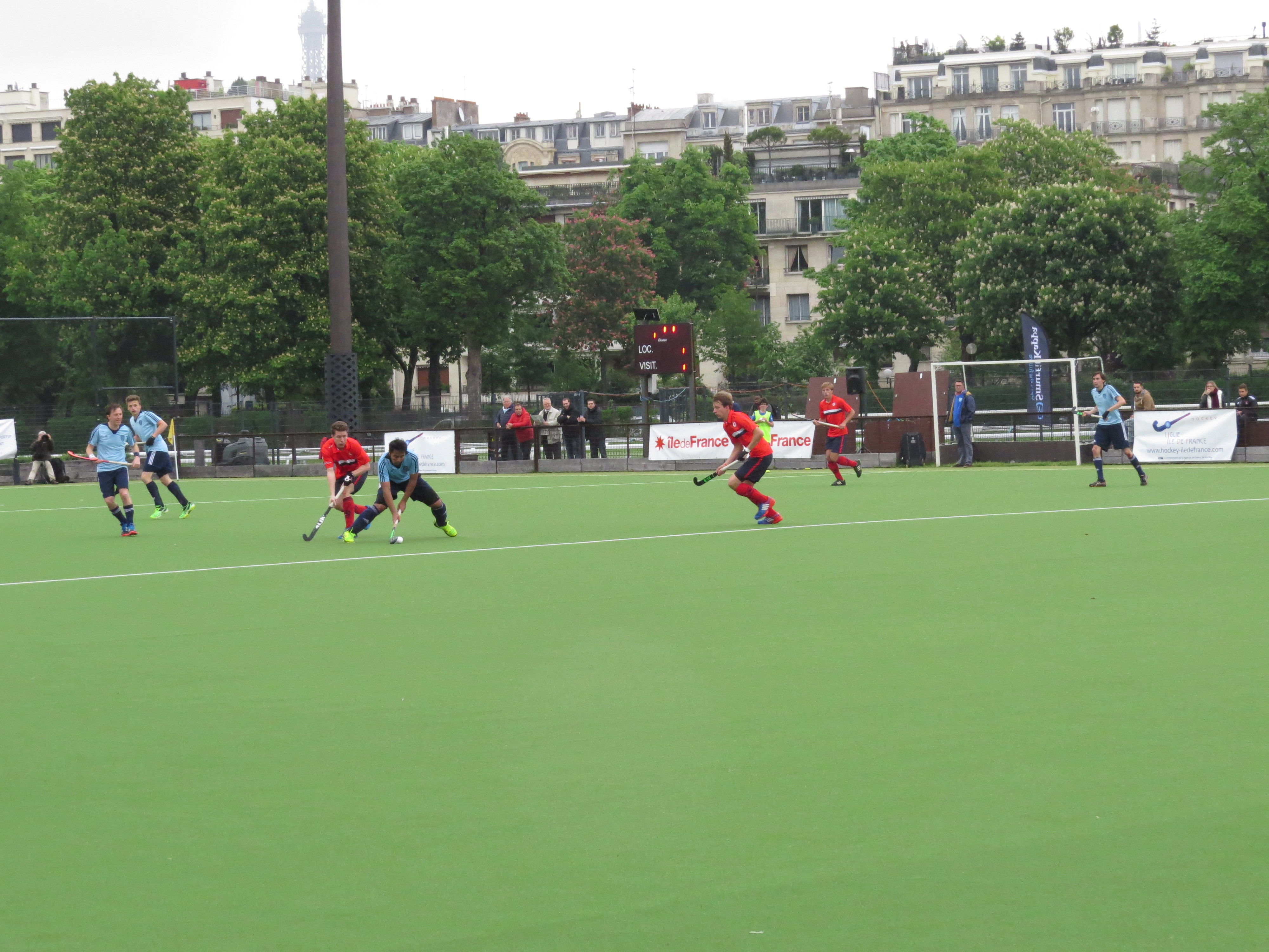 Championnat de France masculin de hockey sur gazon 2014-2015: Paris Jean Bouin - Lyon Victoire du PJB 5-4